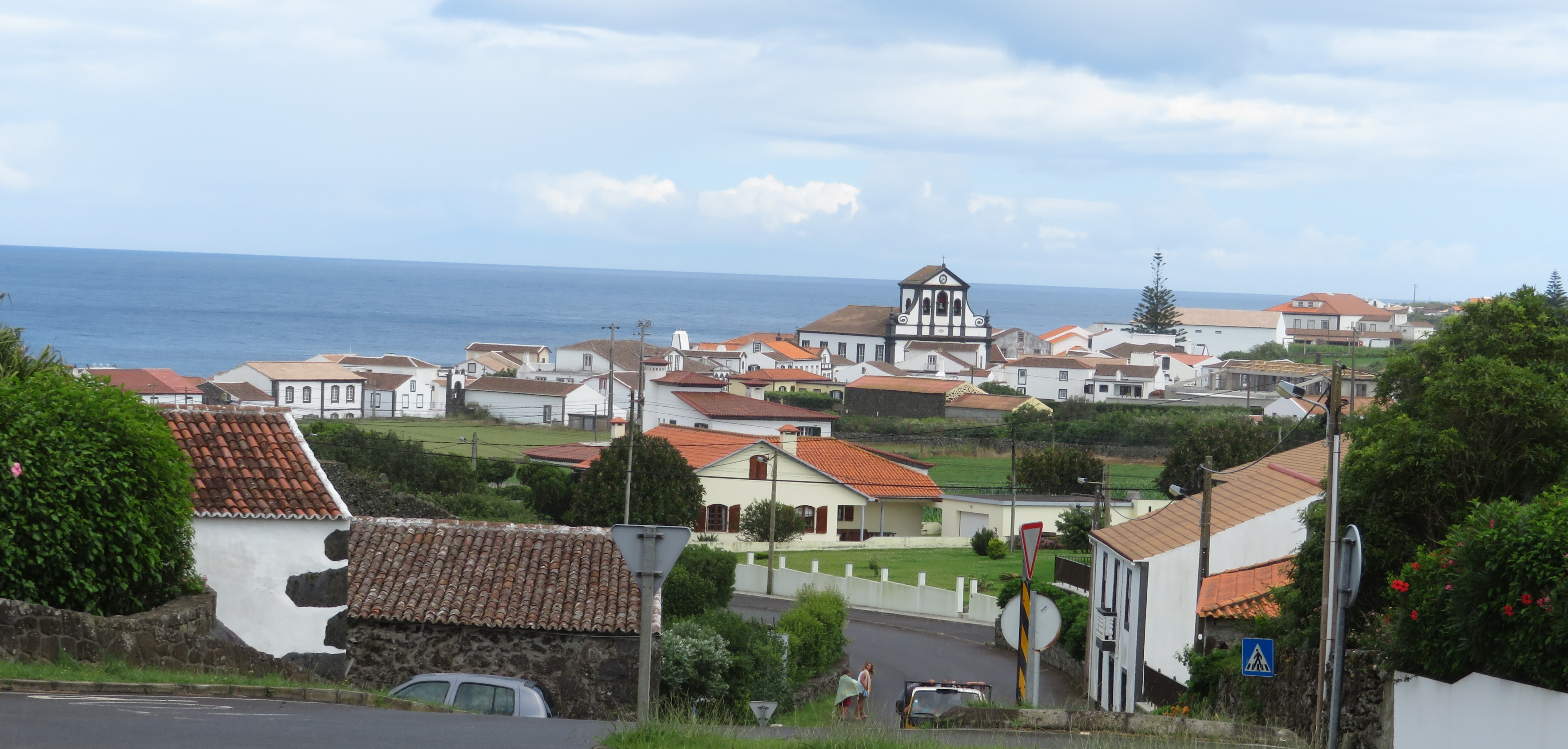 Centro da freguesia, São Mateus da Praia, ilha Graciosa, Acores, Portugal